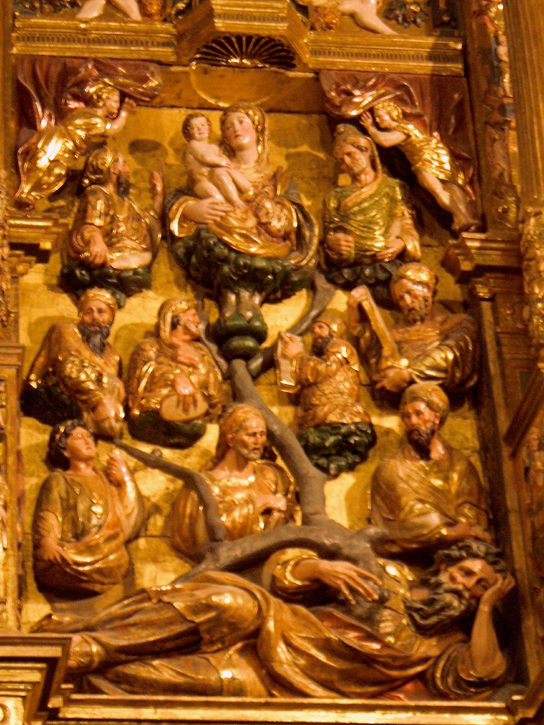 Church of Santa María del Palacio, Logroño